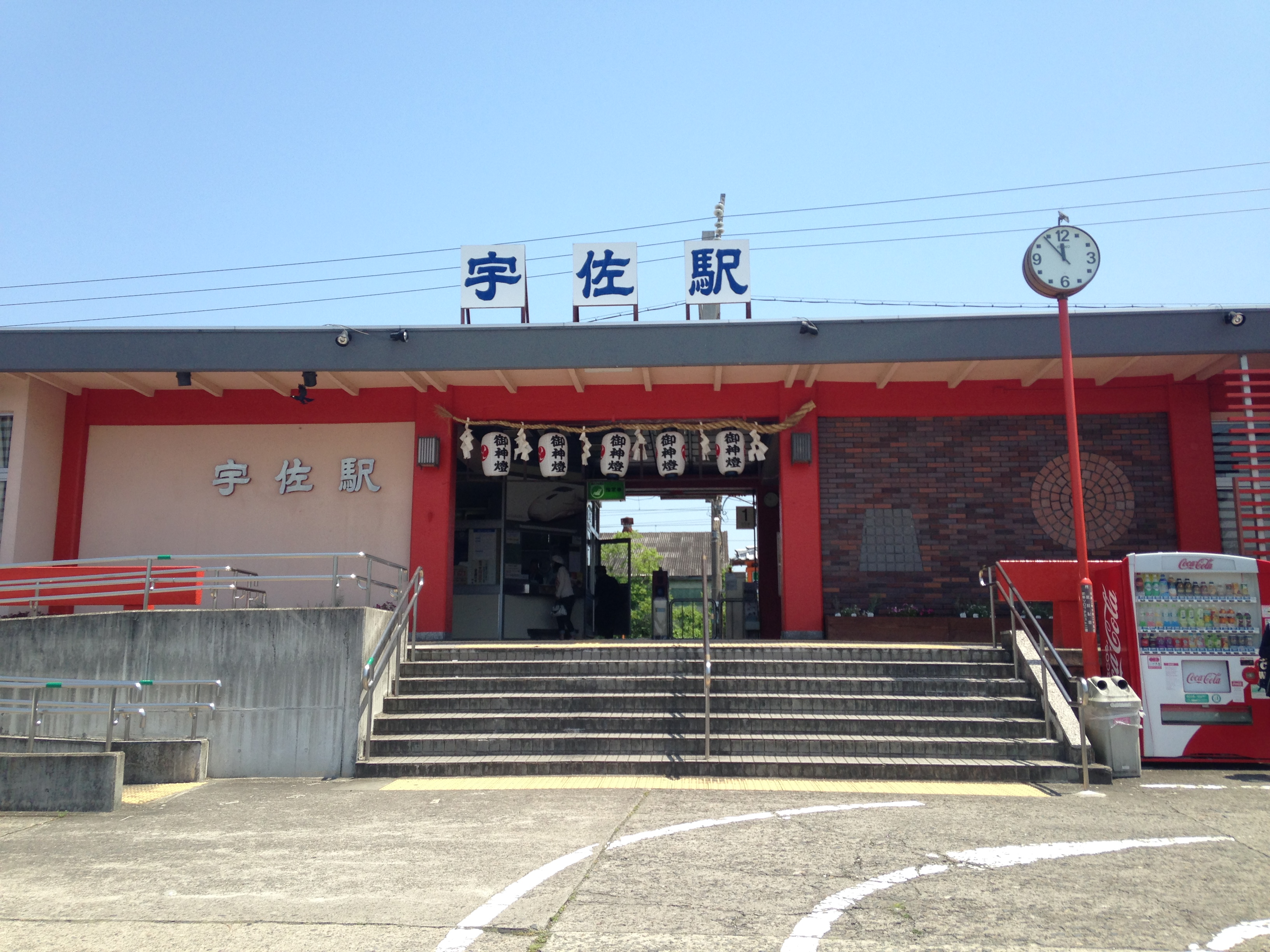 宇佐駅駅舎